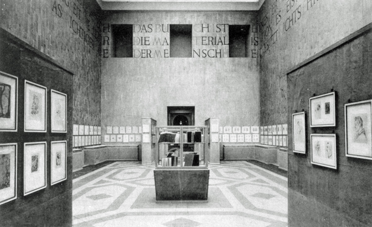 Ein Ausstellungsraum zur Internationalen Buchkunstausstellung 1927 im Grassimuseum in Leipzig